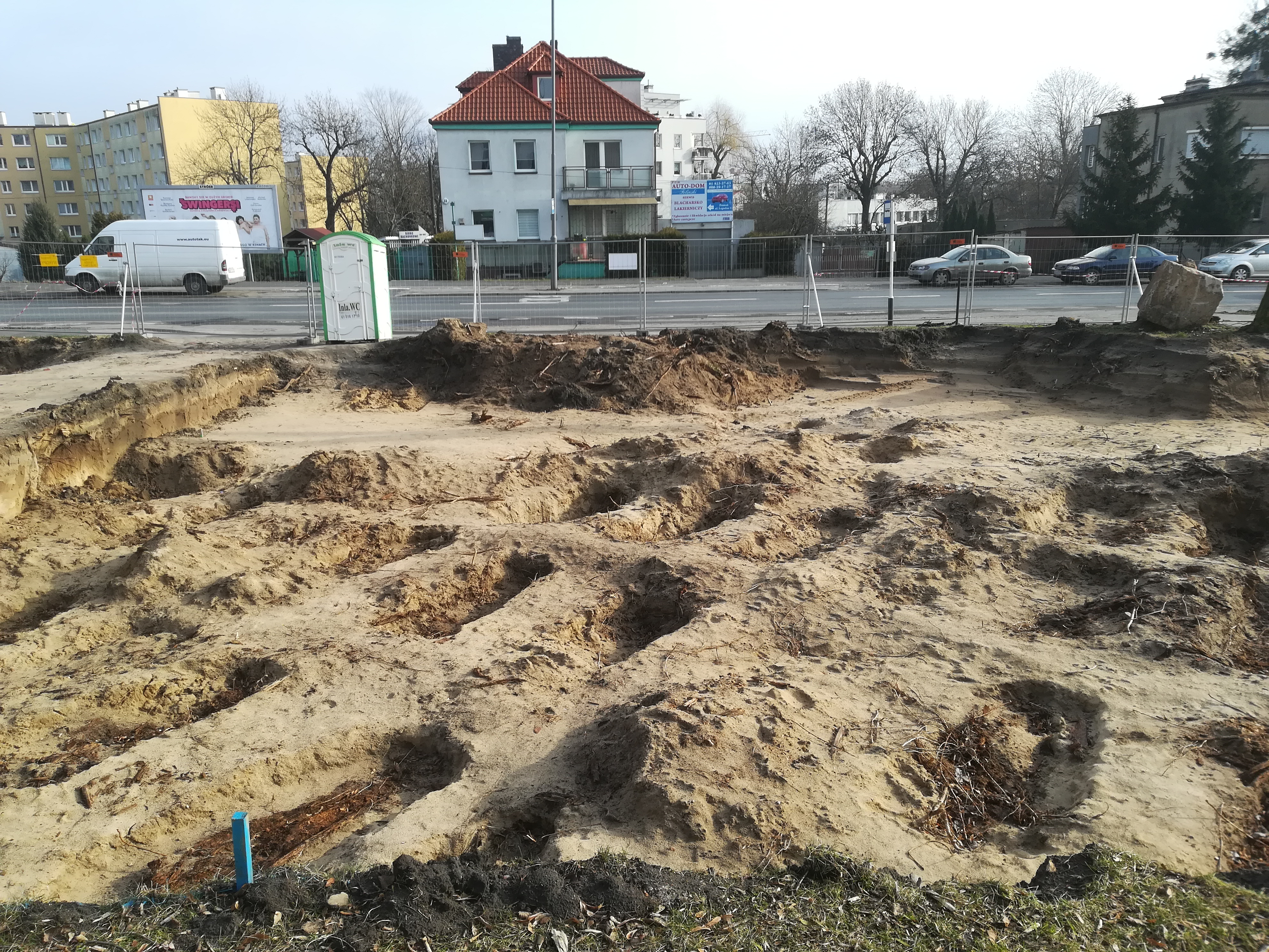 Park Kosynierów w Poznaniu - dawny cmentarz ewangelicki. Ekshumacje w roku 2020 przed budową linii tramwajowej na Naramowice.